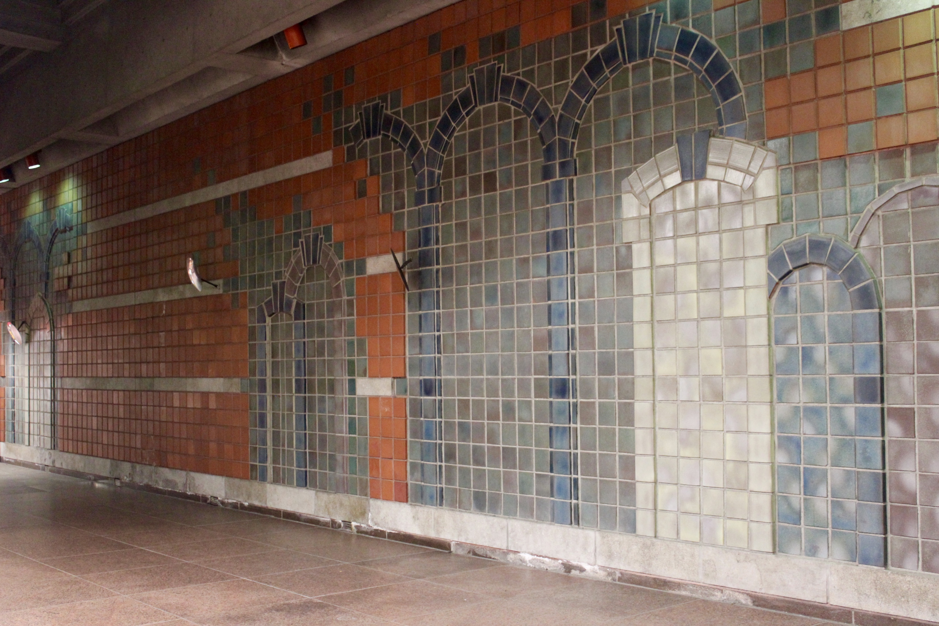 Murale de Gilbert Poissant station Outremont